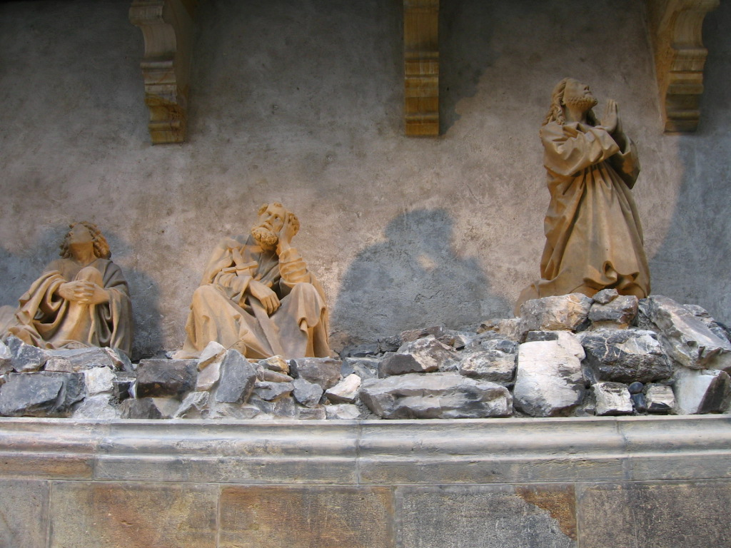 Kopie sousoší Olivetské hory u kostela sv. Mořice v Olomouci (detail)